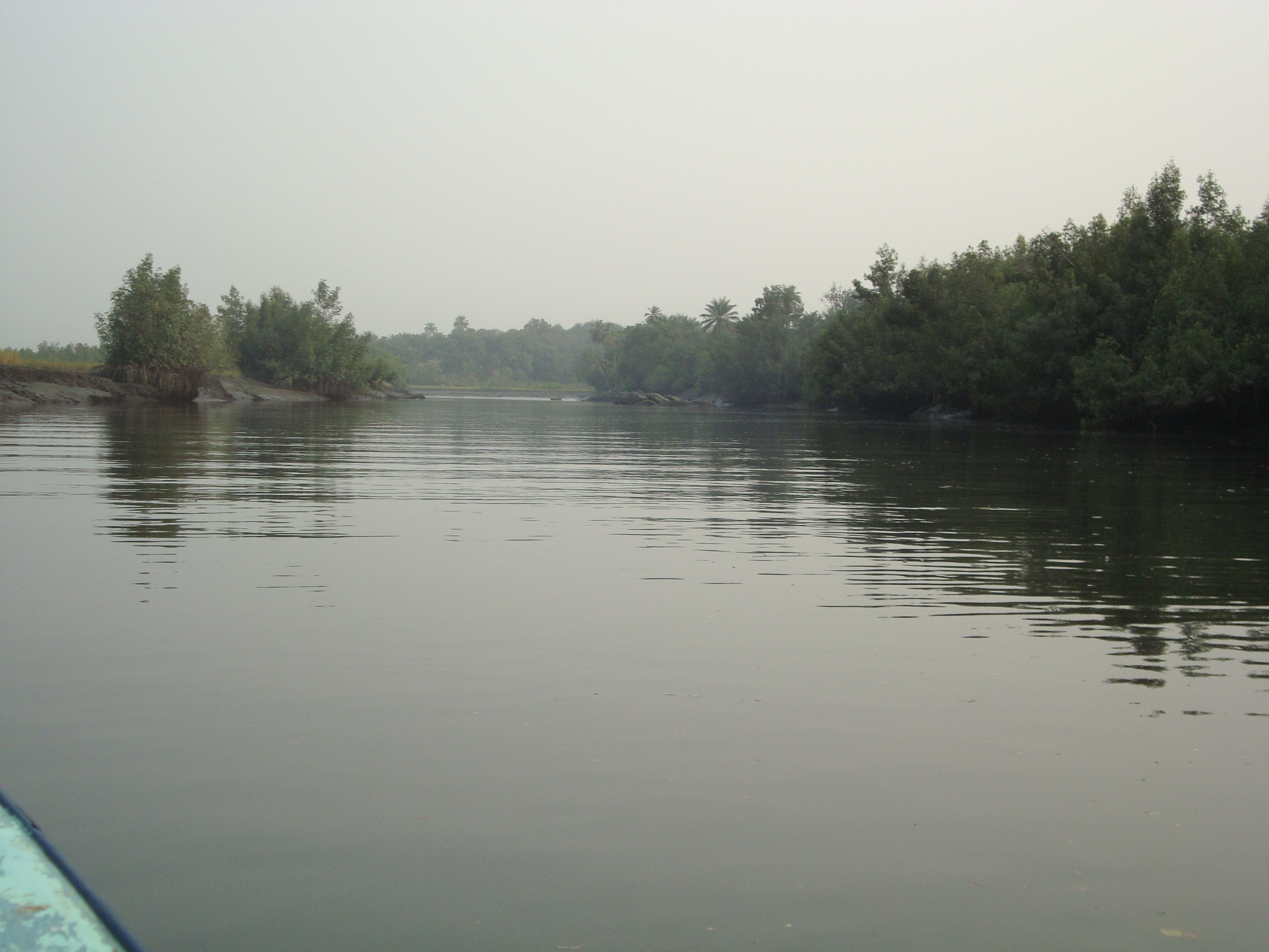 Port Loko River - Feb 2011